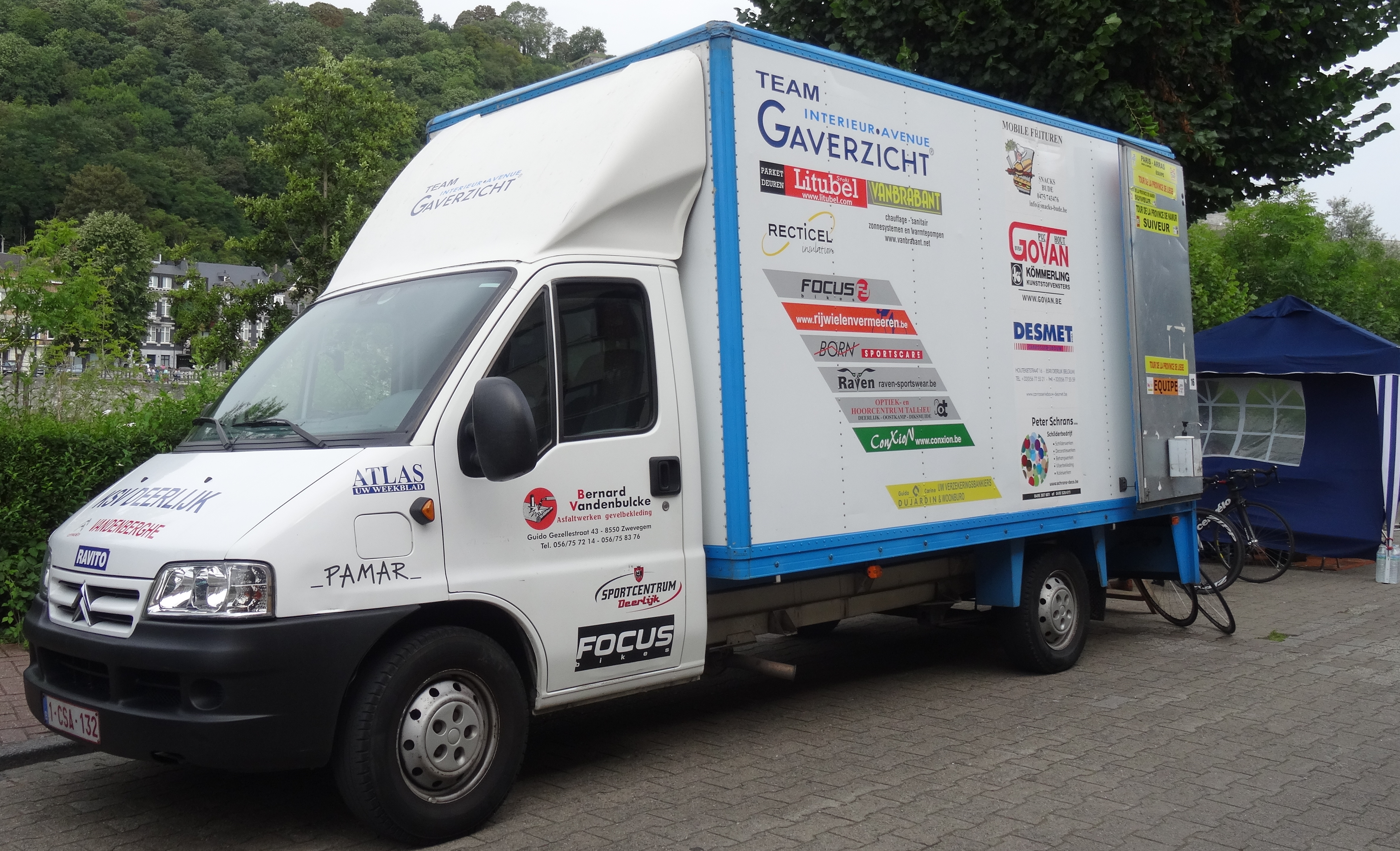 Reportage photographique réalisé le mercredi 6 août à l'occasion du départ de la première étape du Tour de la province de Namur 2014 à Jambes (Namur), Belgique.